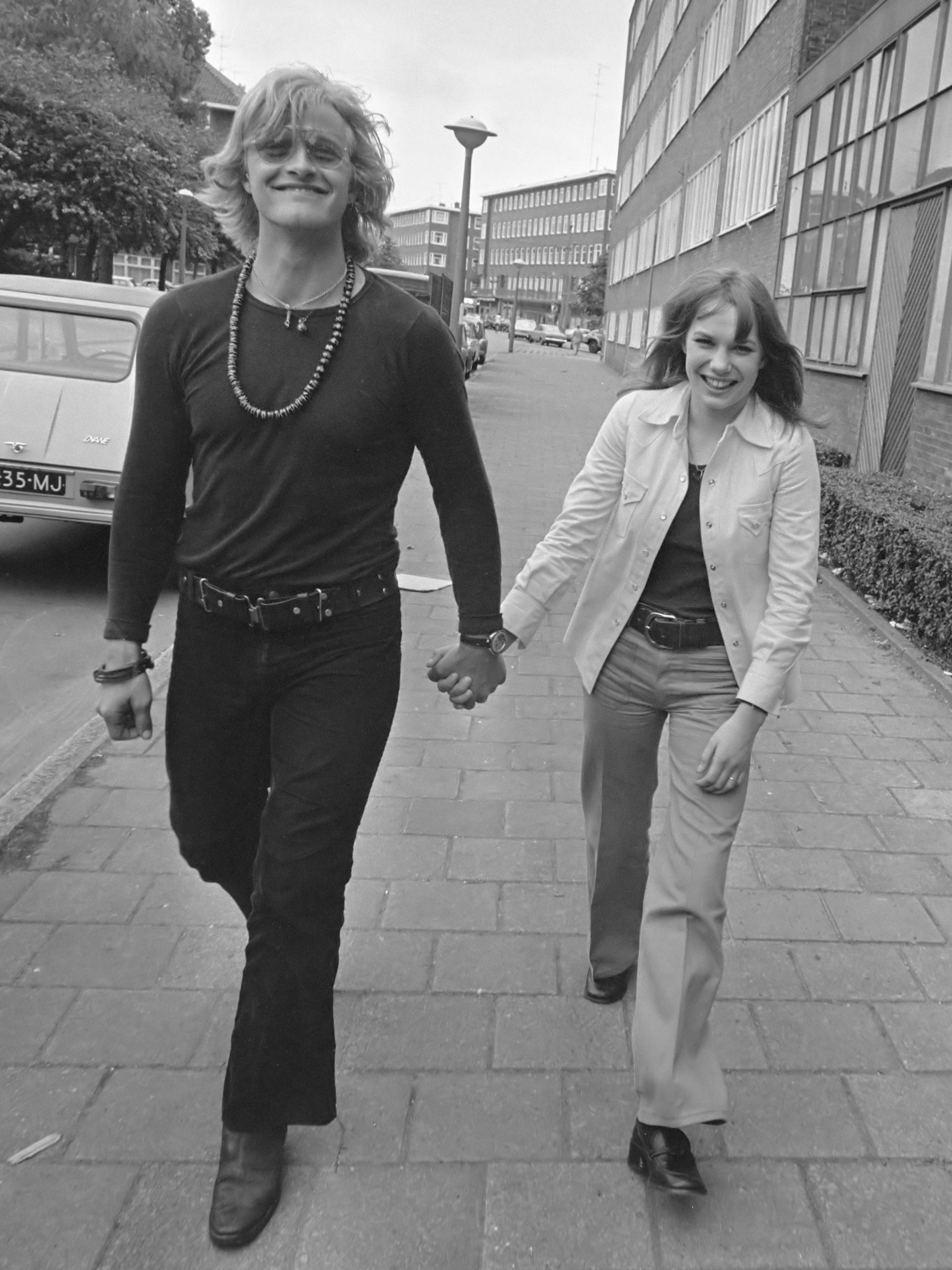 Verfilming van Turks Fruit (naar de roman van Jan Wolkers uit 1969) door Paul Verhoeven: Rutger Hauer en Monique van de Ven 7 juni 1972